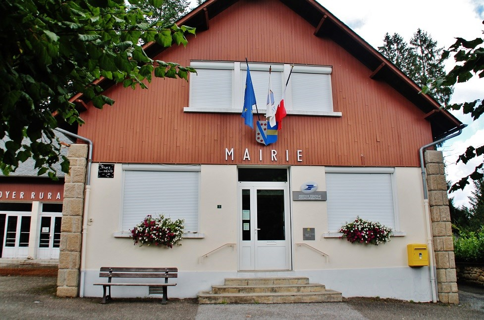 La Mairie